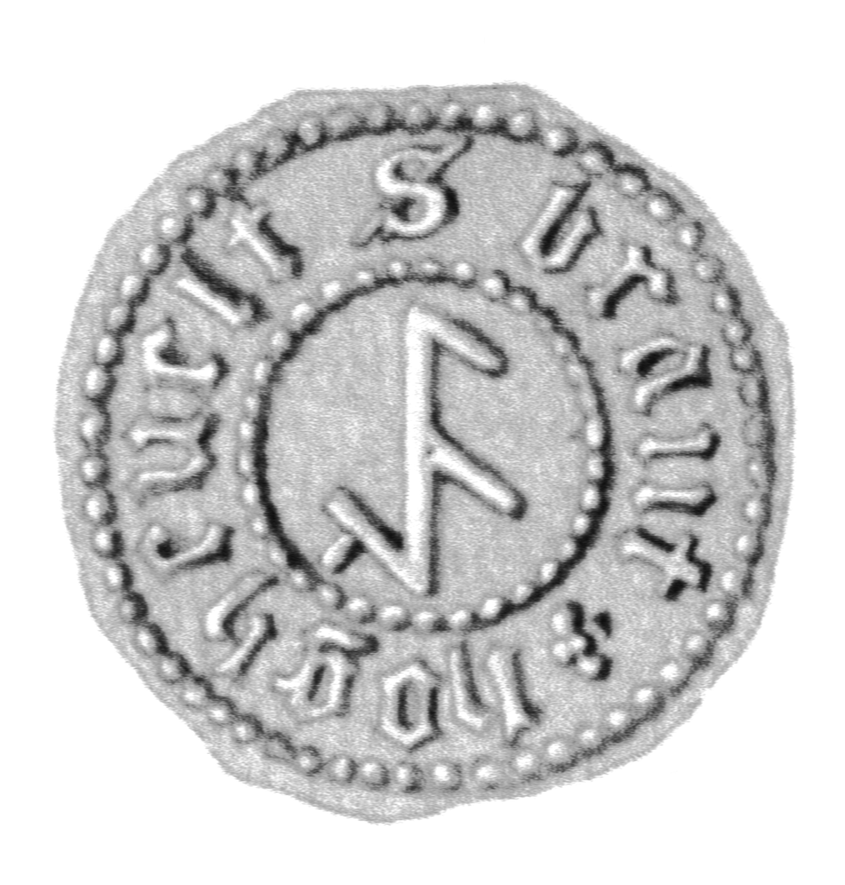 Siegel des Ratsmannes Brand Hoevelt. Das Siegel stammt aus der Zeit um 1480. Siehe Emil Ferdinand Fehling: Lübeckische Ratslinie, Nr. 565 (Brand Hogefeld).